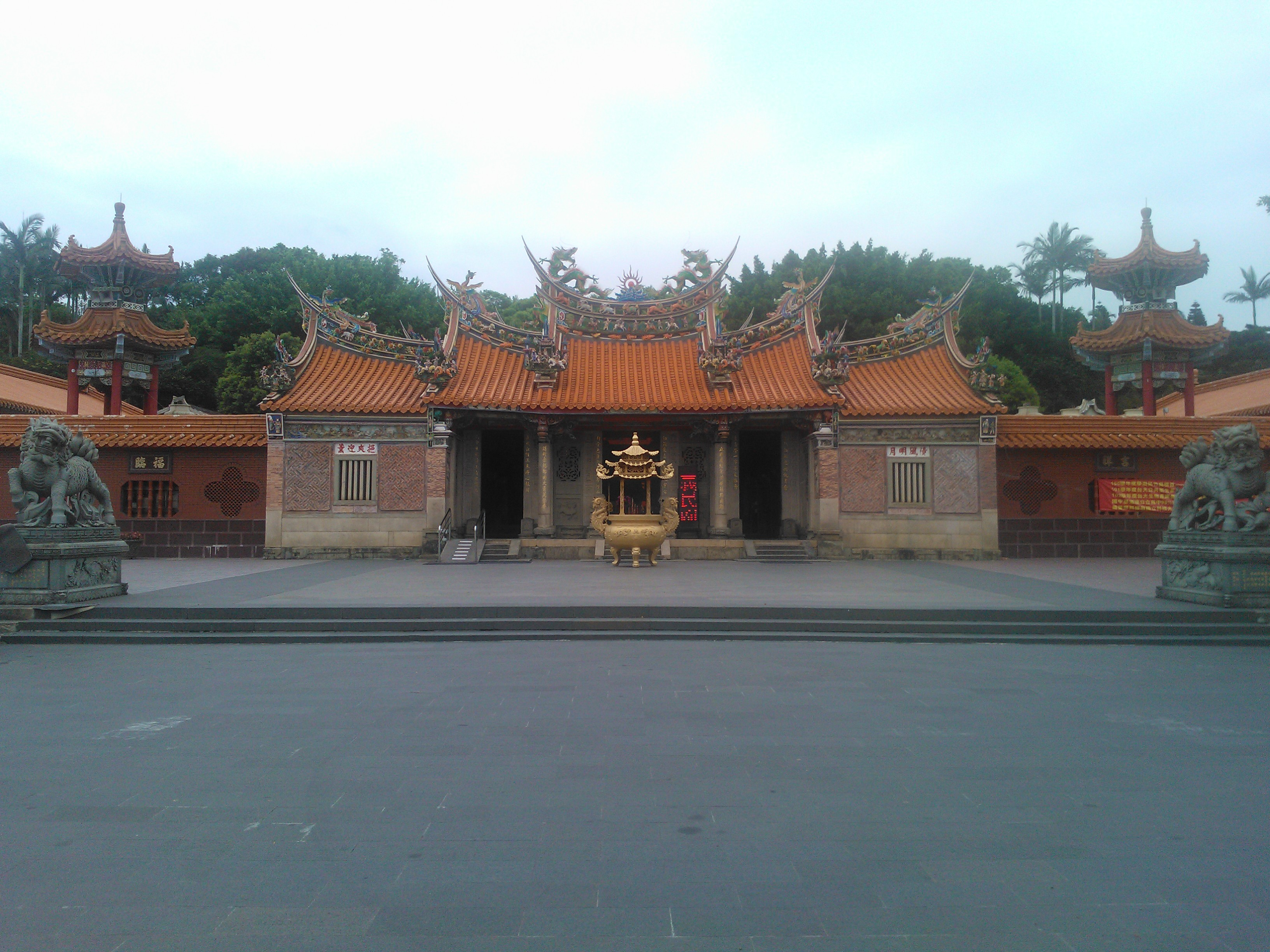 新埔褒忠亭